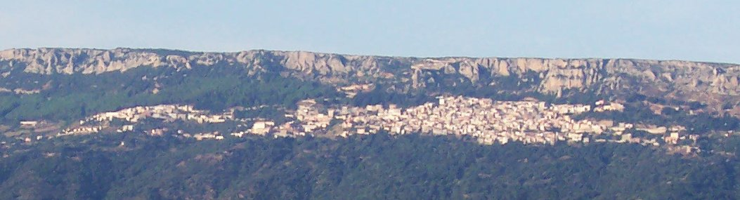 Il paese di Baunei (Og)